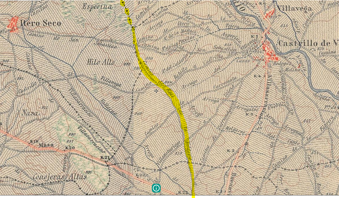 Camino Real de la Valdavia a su paso por el Alto de la Esperina. Este recorte proviene de un Mapa de 1929 donde se aprecia como el camino aún existía y se reconocía con ese nombre en esa época, proyectándose el mismo hacia el norte por la divisoria de los municipios de Itero Seco y Bárcena de Campos..